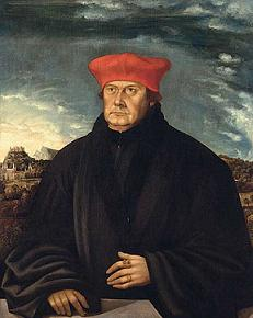 Porträt des Matthäus Lang von Wellenburg (1468-1540), Bischof von Gurk, Erzbischof von Salzburg und Kardinal (Kunsthistorisches Museum Wien)